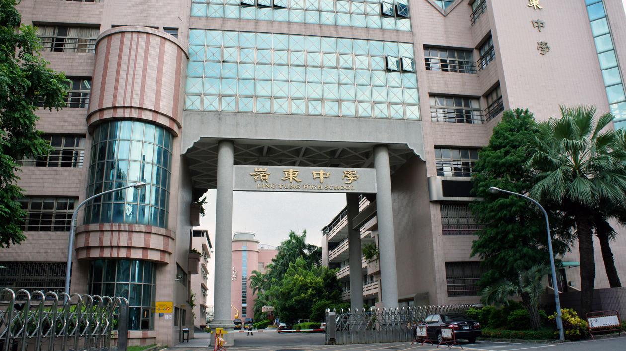 台中市私立嶺東高中。